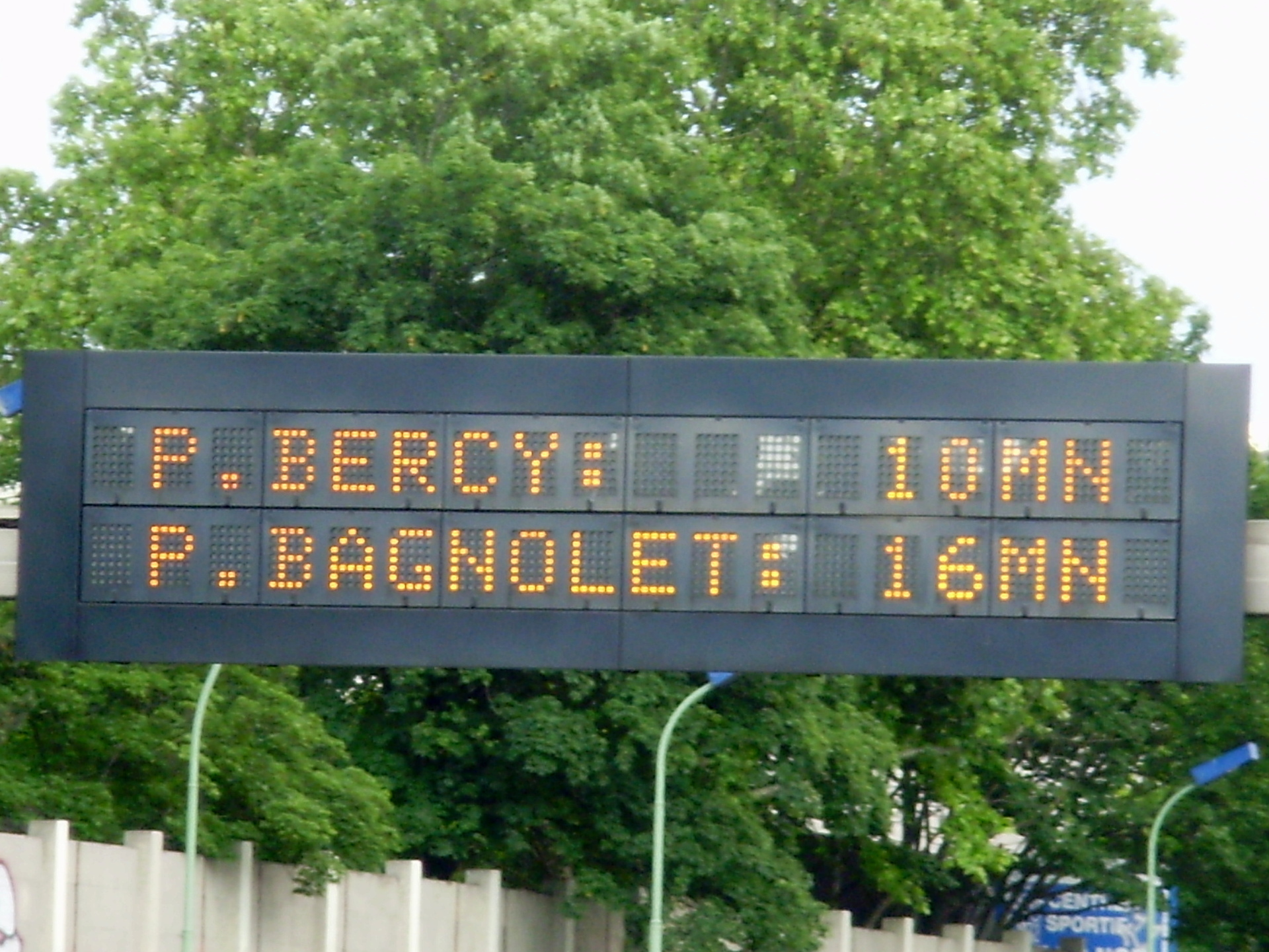 Panneau à message variable sur la chaussée extérieure du boulevard pérphérique de Paris, France, près de la porte de Châtillon, dans le 14e arrondissement de Paris